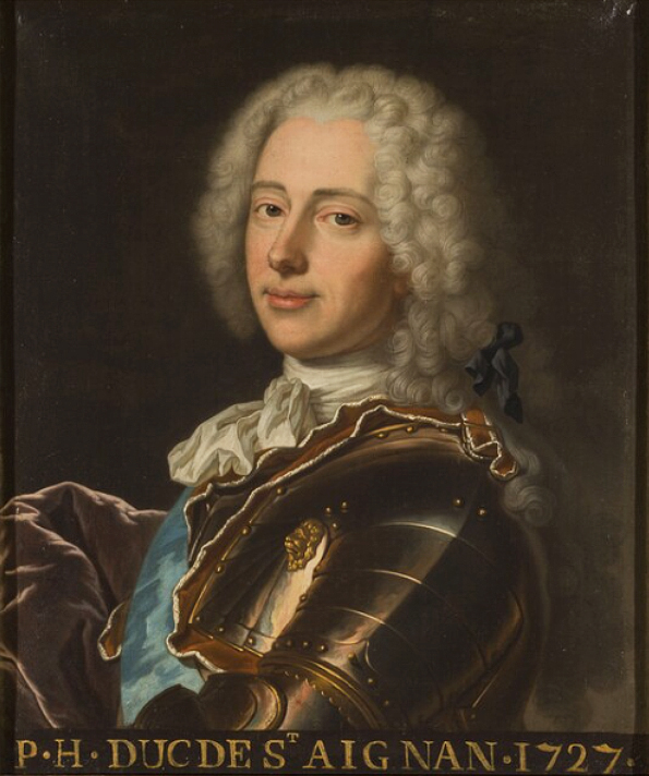 Paul-Hippolyte de Beauvilliers, duc de Saint-Aignan (1684-1776)